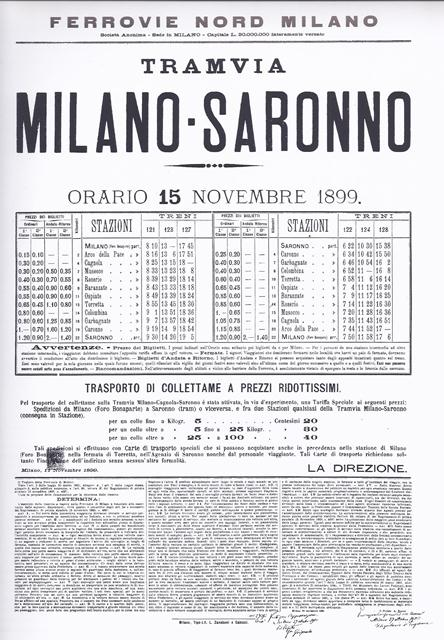 Orario tram Milano-Saronno